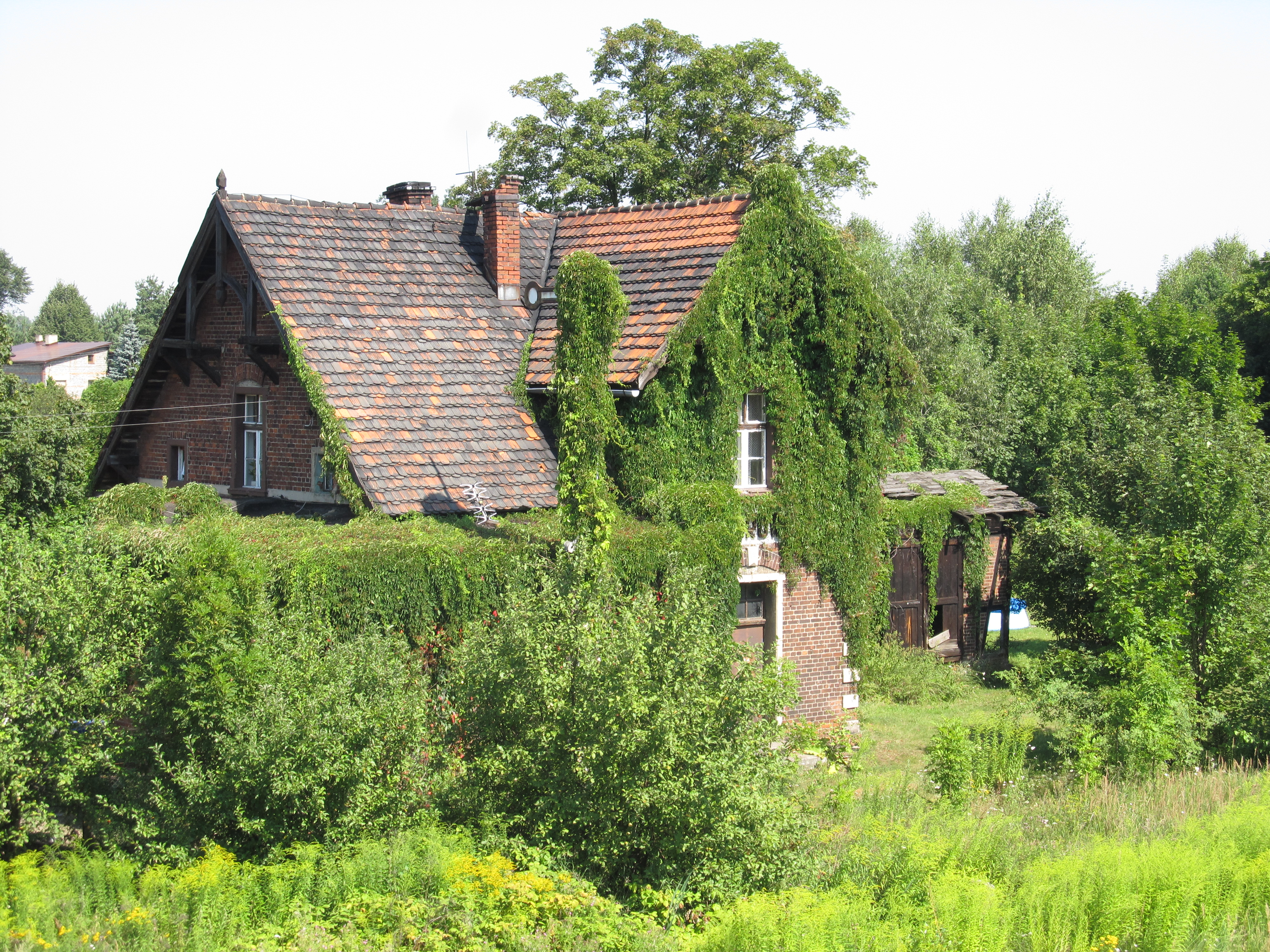 Linia kolei wąskotorowej Gliwice-Racibórz na odcinku Nieborowice–Rudy – układ torowy, zabudowania dworcowe w Nieborowicach, Pilchowicach i Stanicy oraz budowle inżynierskie gmina Pilchowice, Pilchowice